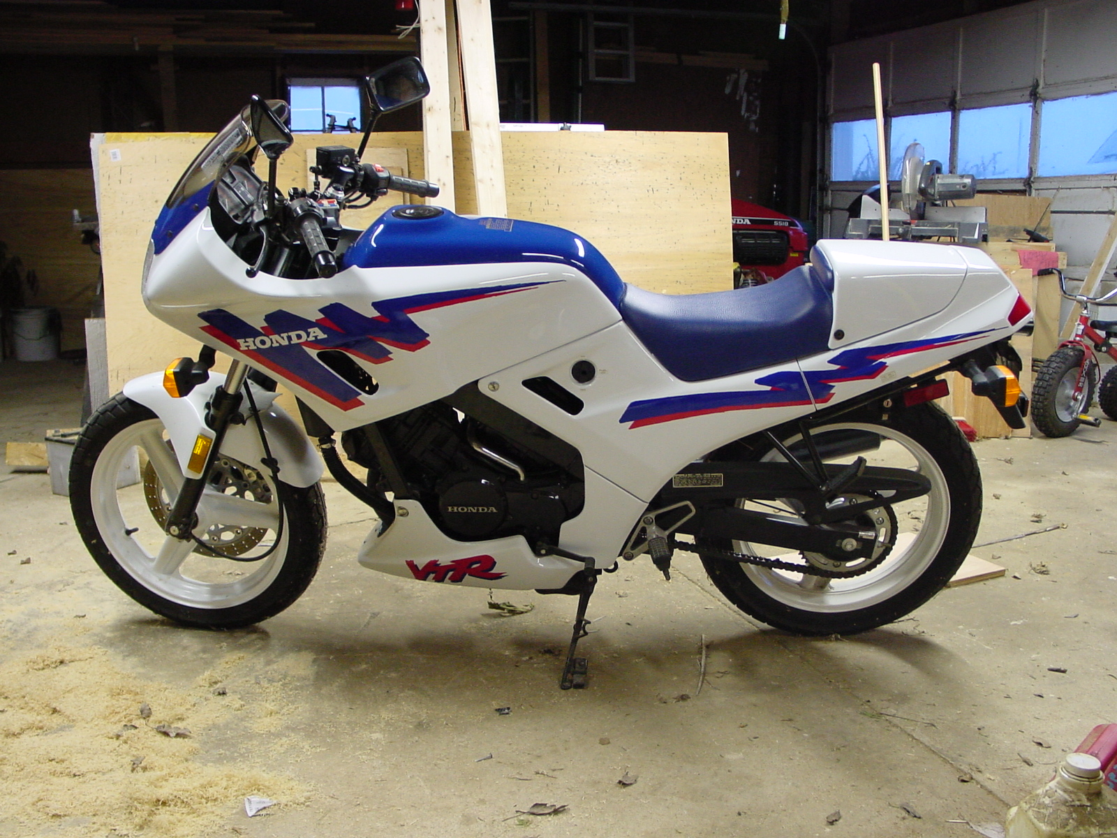 honda.vtr250.1990.taken.2001-03-08